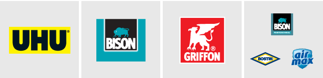 brand adesivi